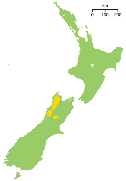 Apteryx haastii A kivi fajok térképének szétbontása 3